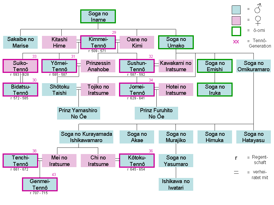 Stammbaum des Soga-Clans